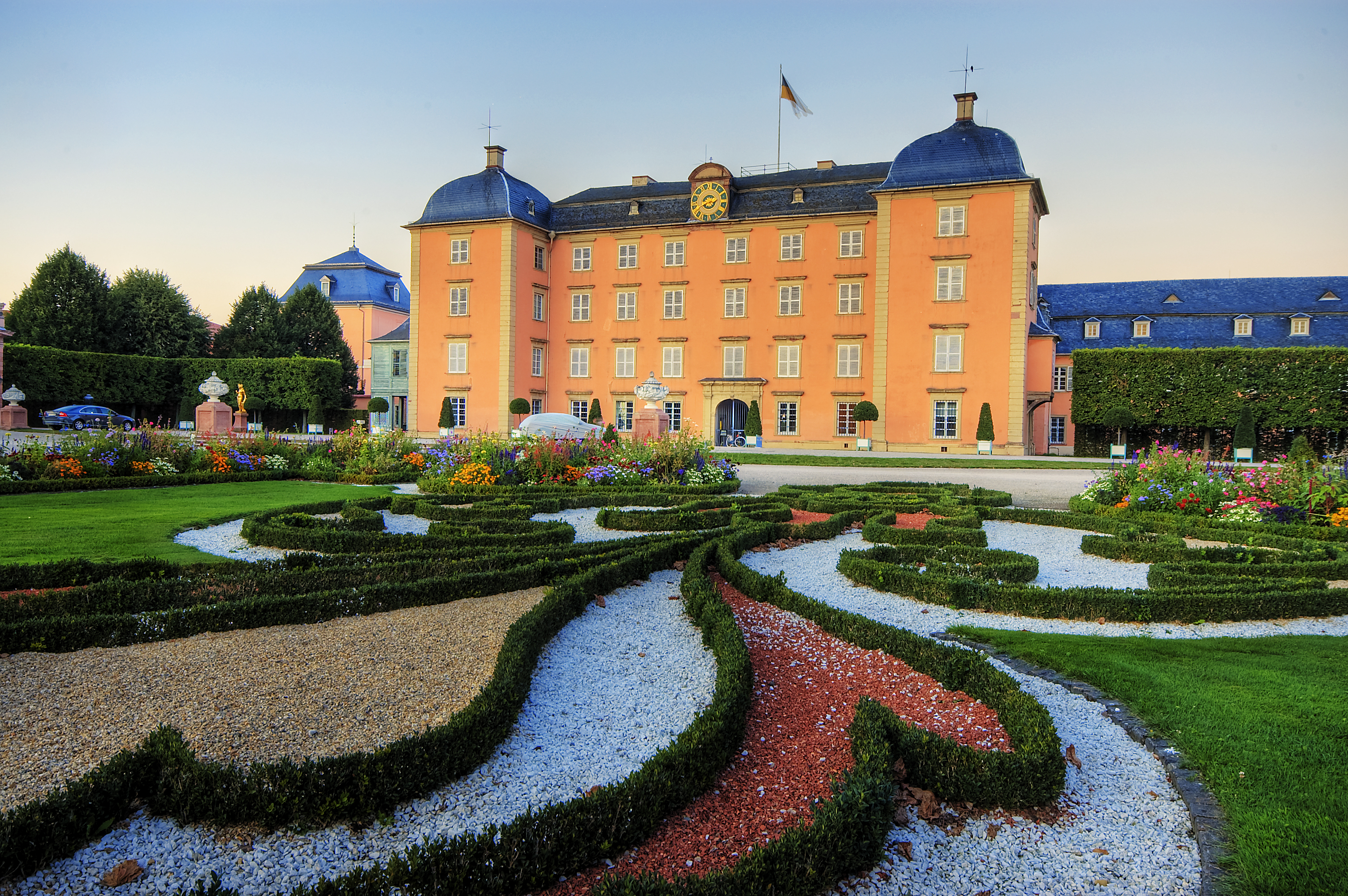 Schlossgarten Schwetzingen